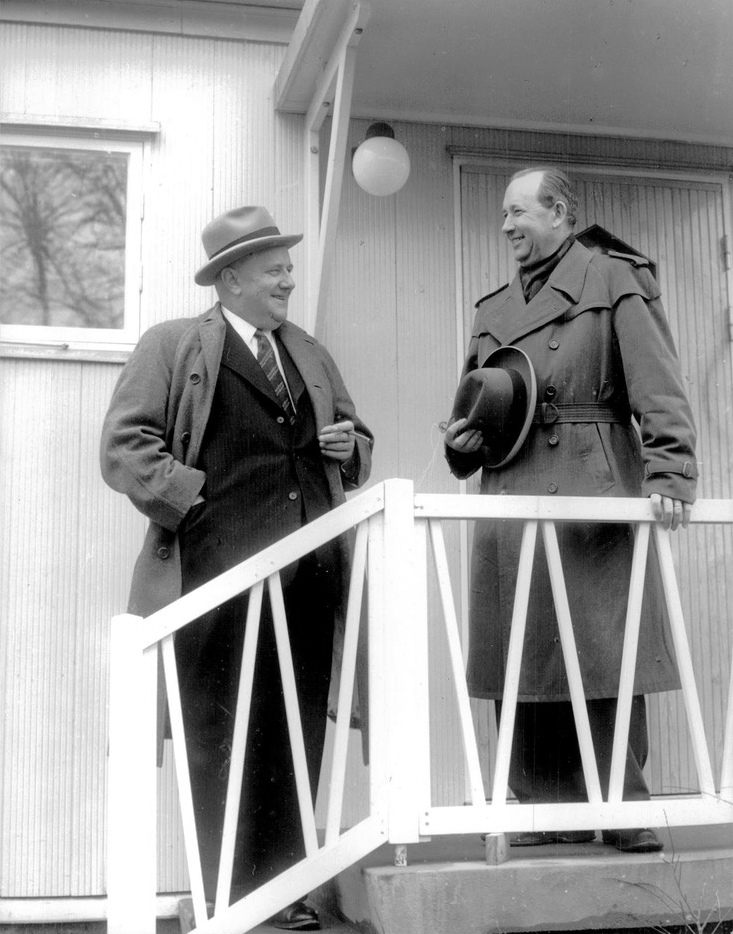 Landshövding Reimer Johansson och mässkommissarien och direktören för hushållsnärinssällskapet Nils Ch. Månsson ser förtröstansfulla ut inför lantbruksmötet i Tönnersa.